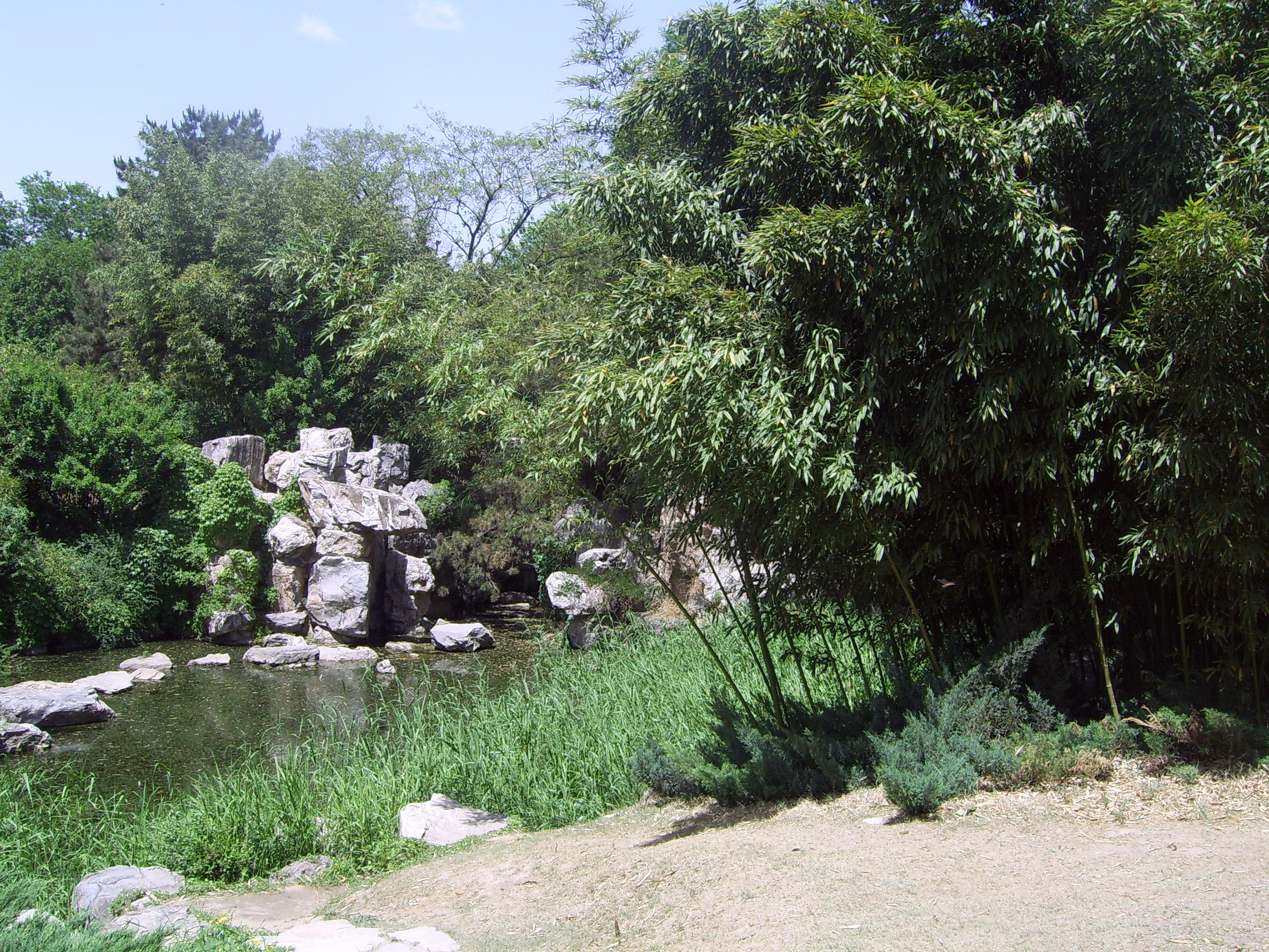 紫竹院的假山与竹子